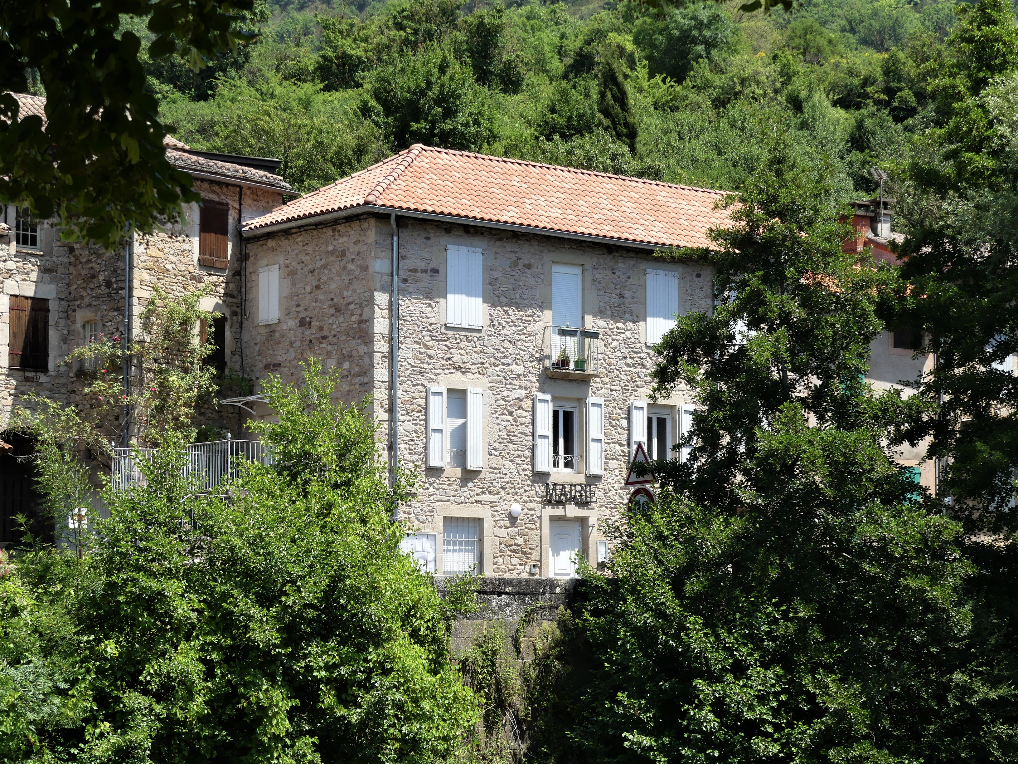 La mairie dans le bourg de Versols, Versols-et-Lapeyre, Aveyron, France.